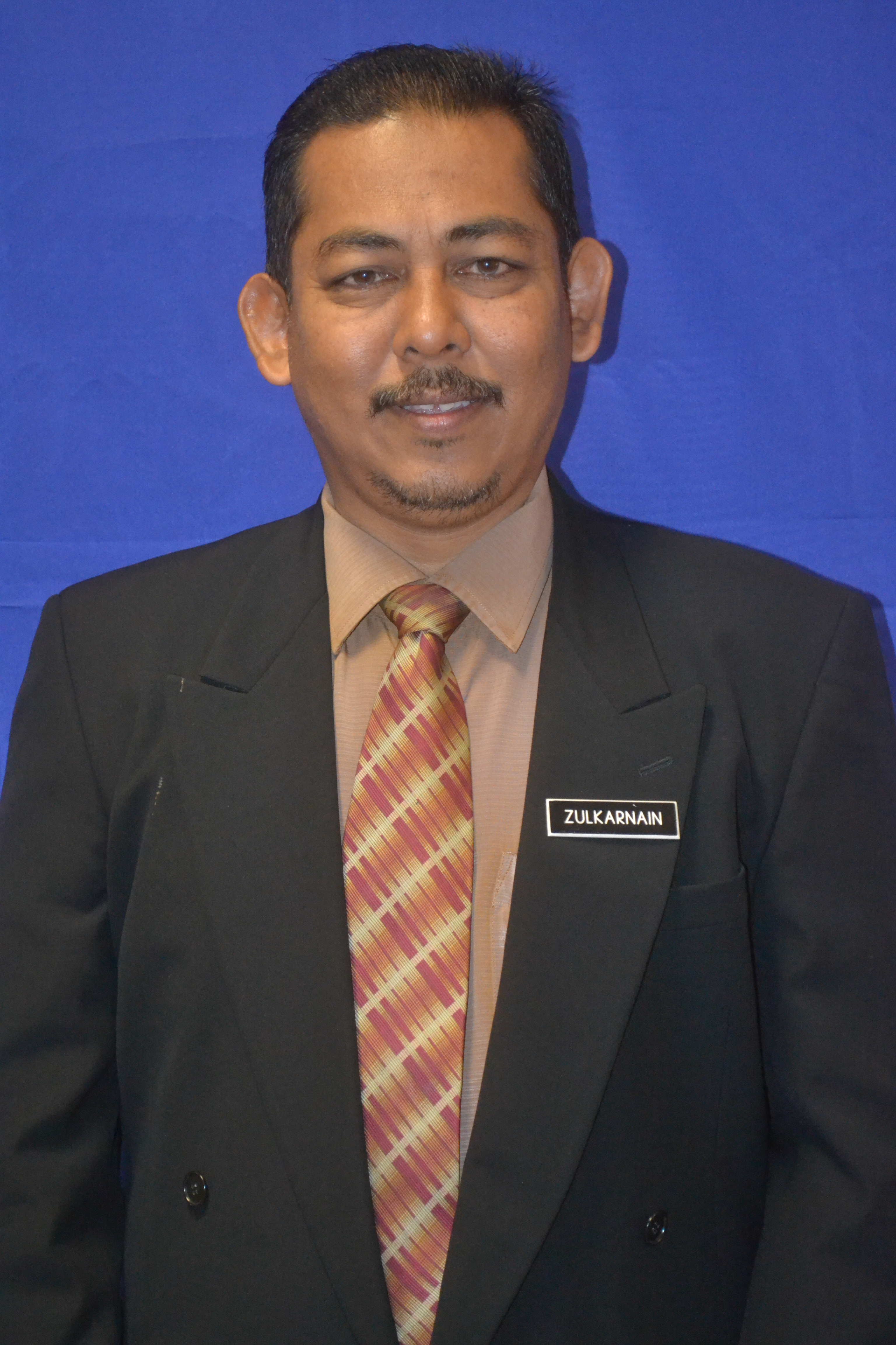 PK HEM 2019